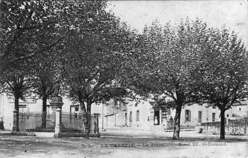 la place de La Valette, Isère, France. Carte postale ancienne.